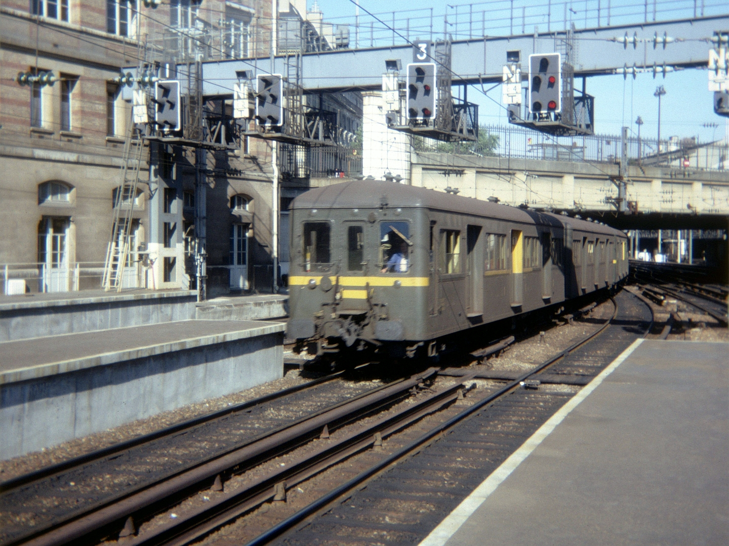 Une rame "Standard" en gare de Paris-Saint-Lazare le 25 septembre 1976.